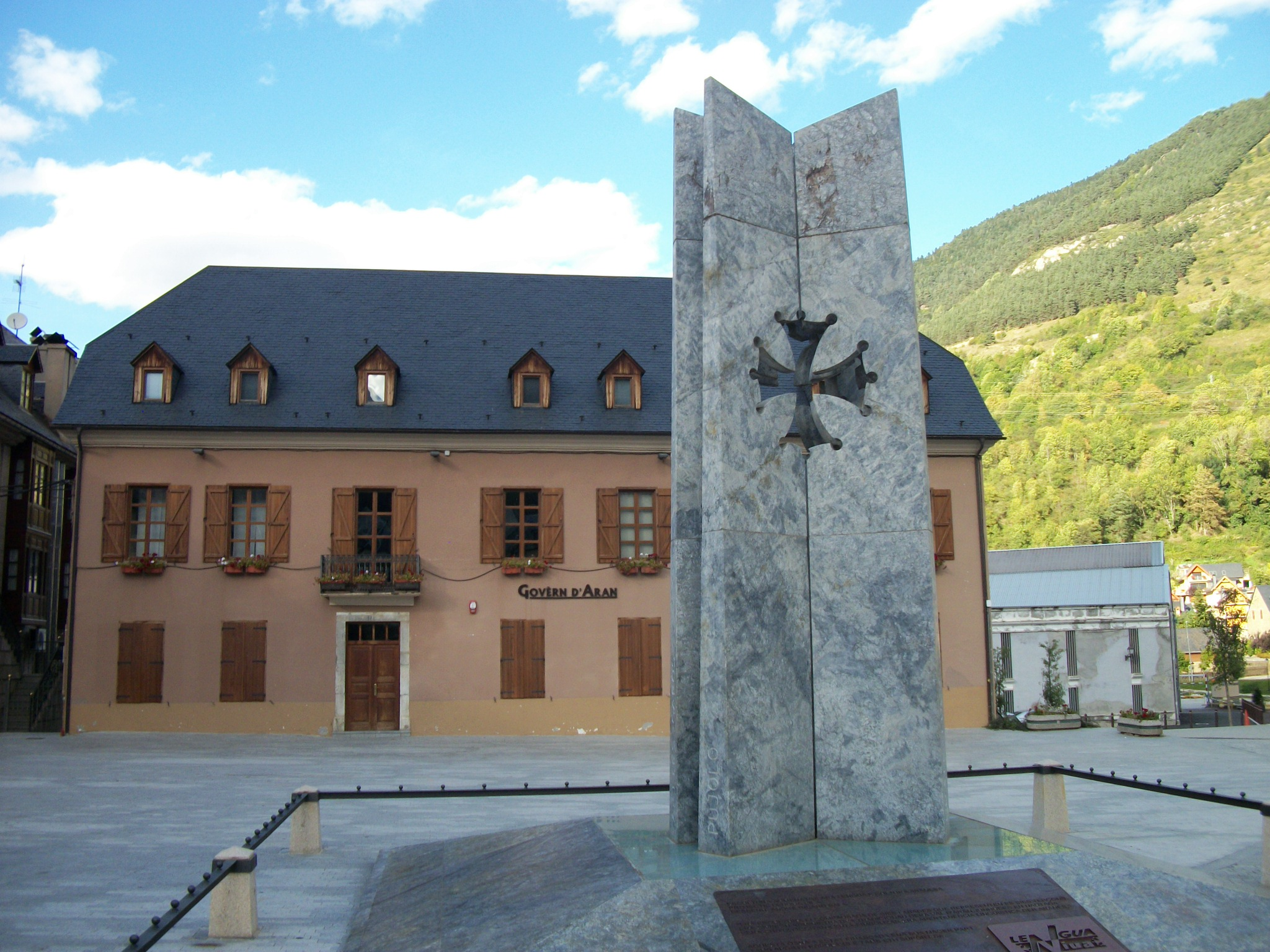 Monument d’Aran per sa lengua